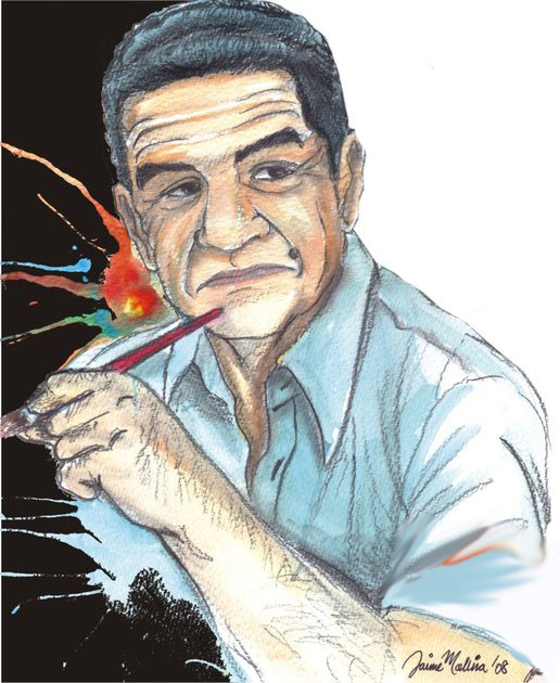 poster para un festival en homenaje a mi padre